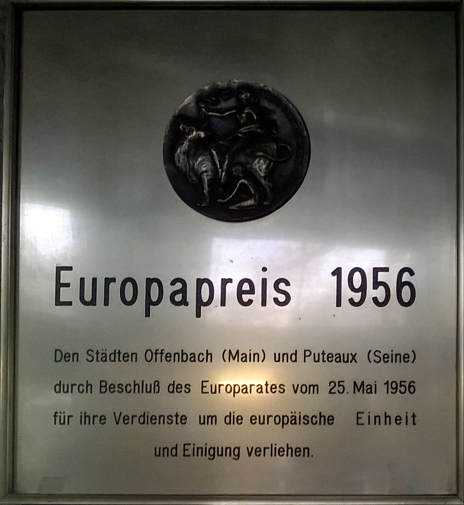 Plakette des Europapreises 1956